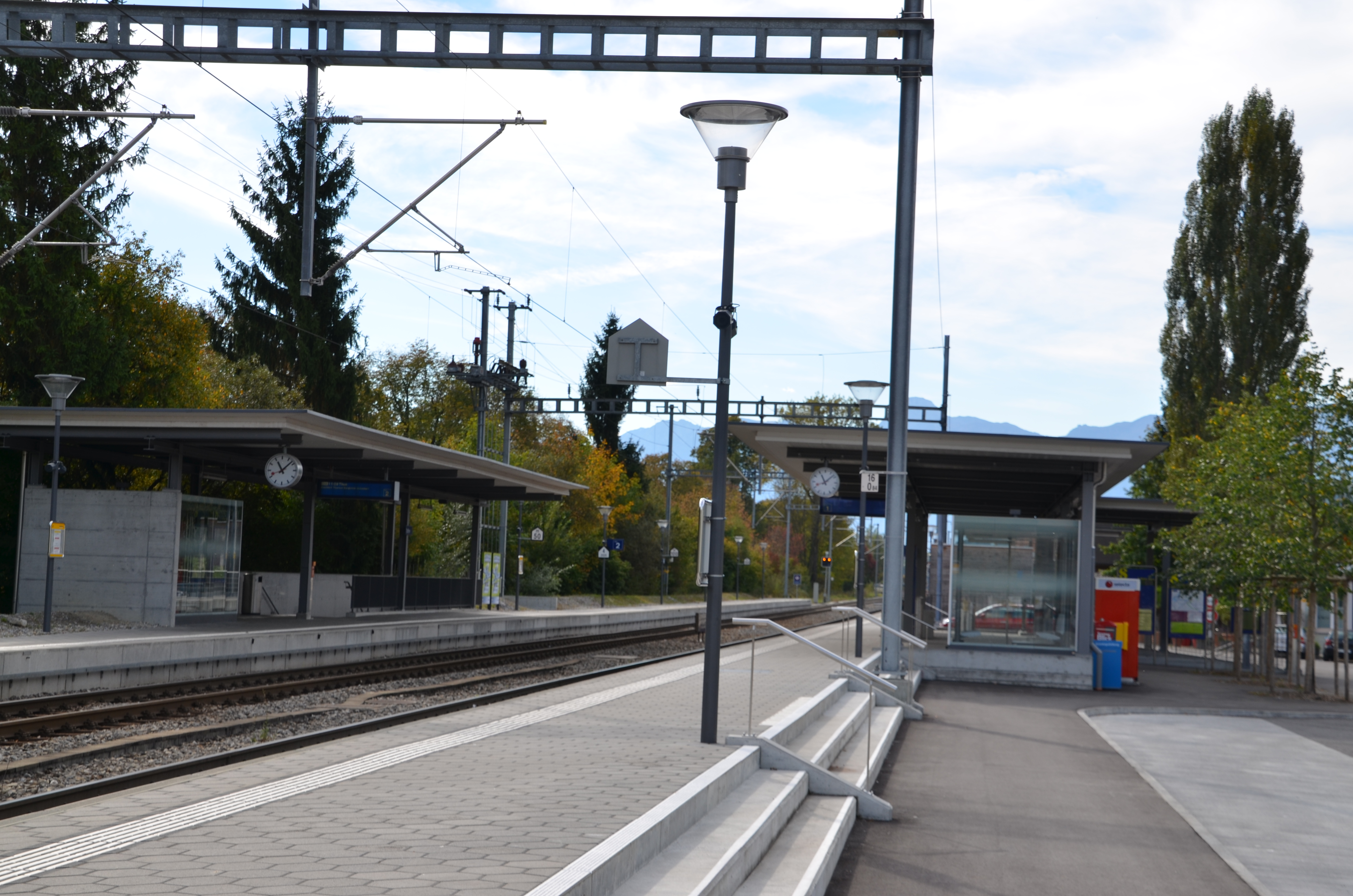 Bahnhof Toffen nach dem Umbau